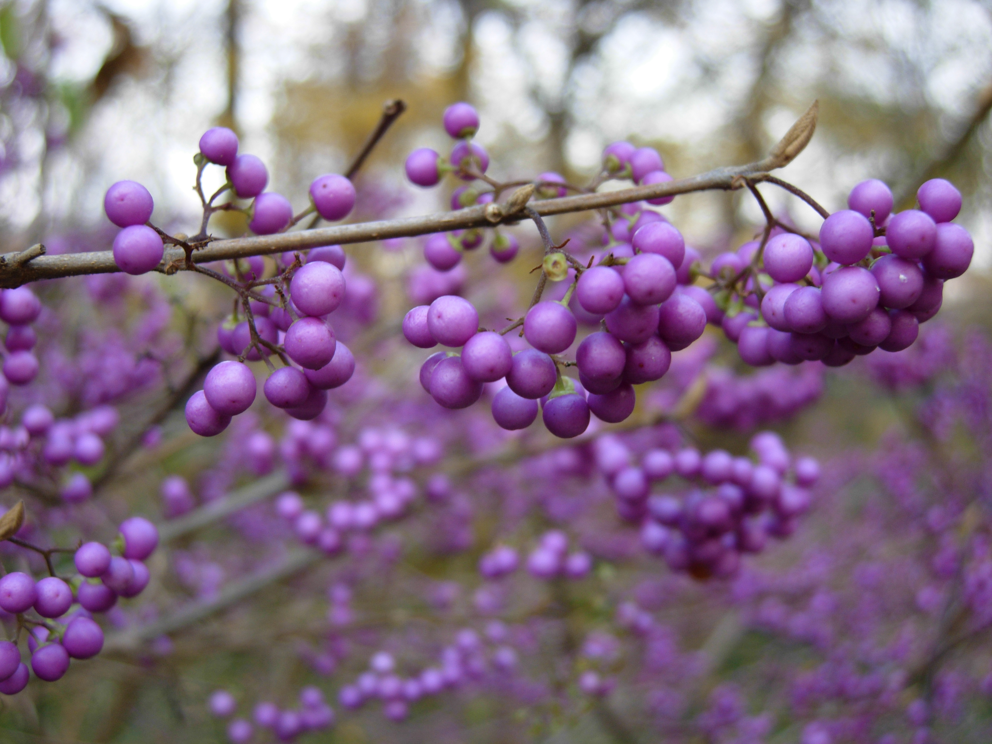 Owoce pięknotki japońskiej (Callicarpa japonica)